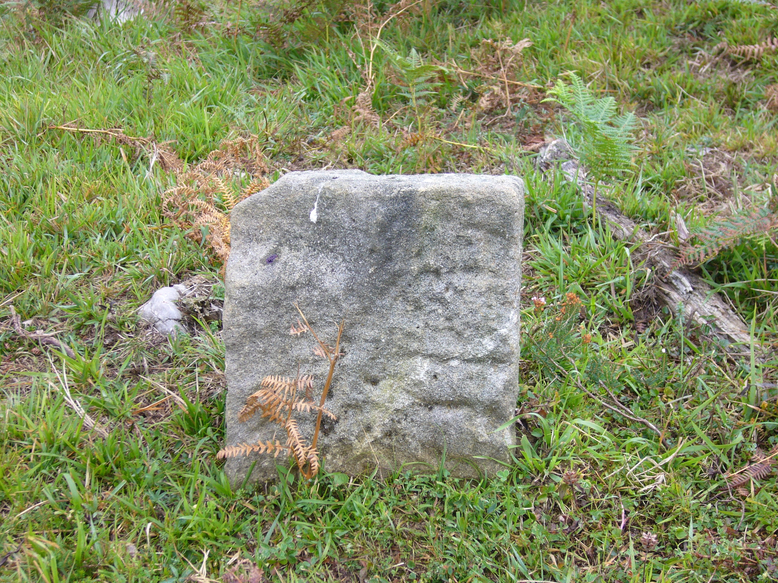 Mugarria Aian, Urruztume aldean. Laurgain eta altzola auzoen artean.